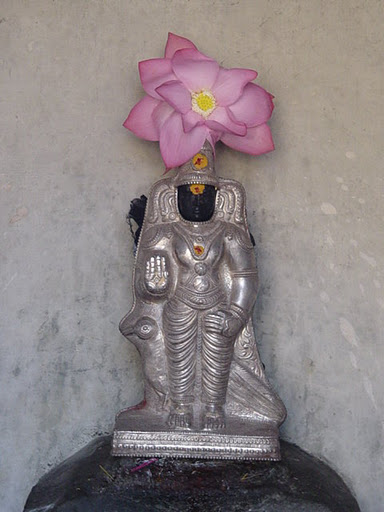 சனீஸ்வர பகவான்